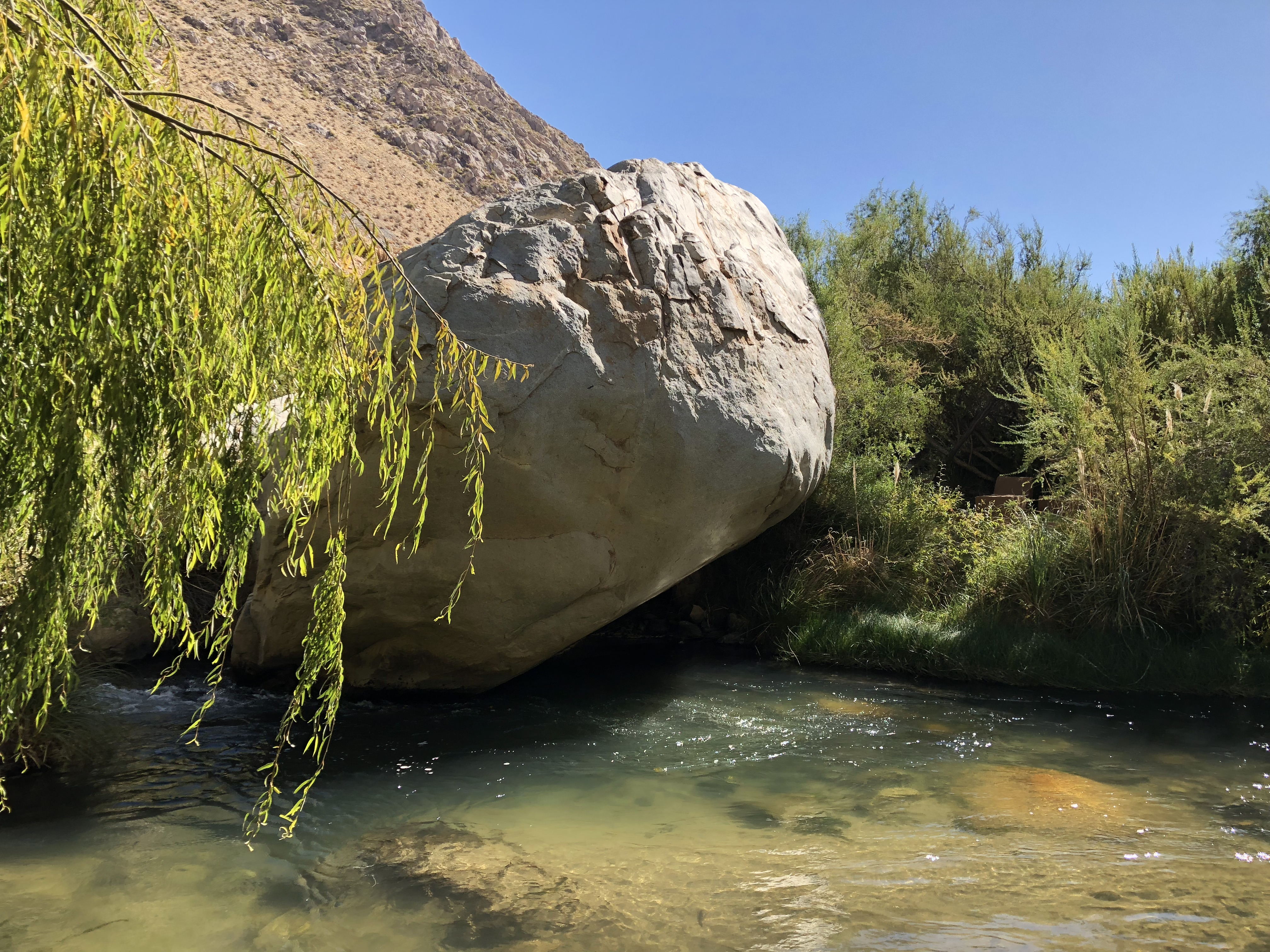 Pozas para el baño en el río Cochiguaz, Valle de Elqui, Chile